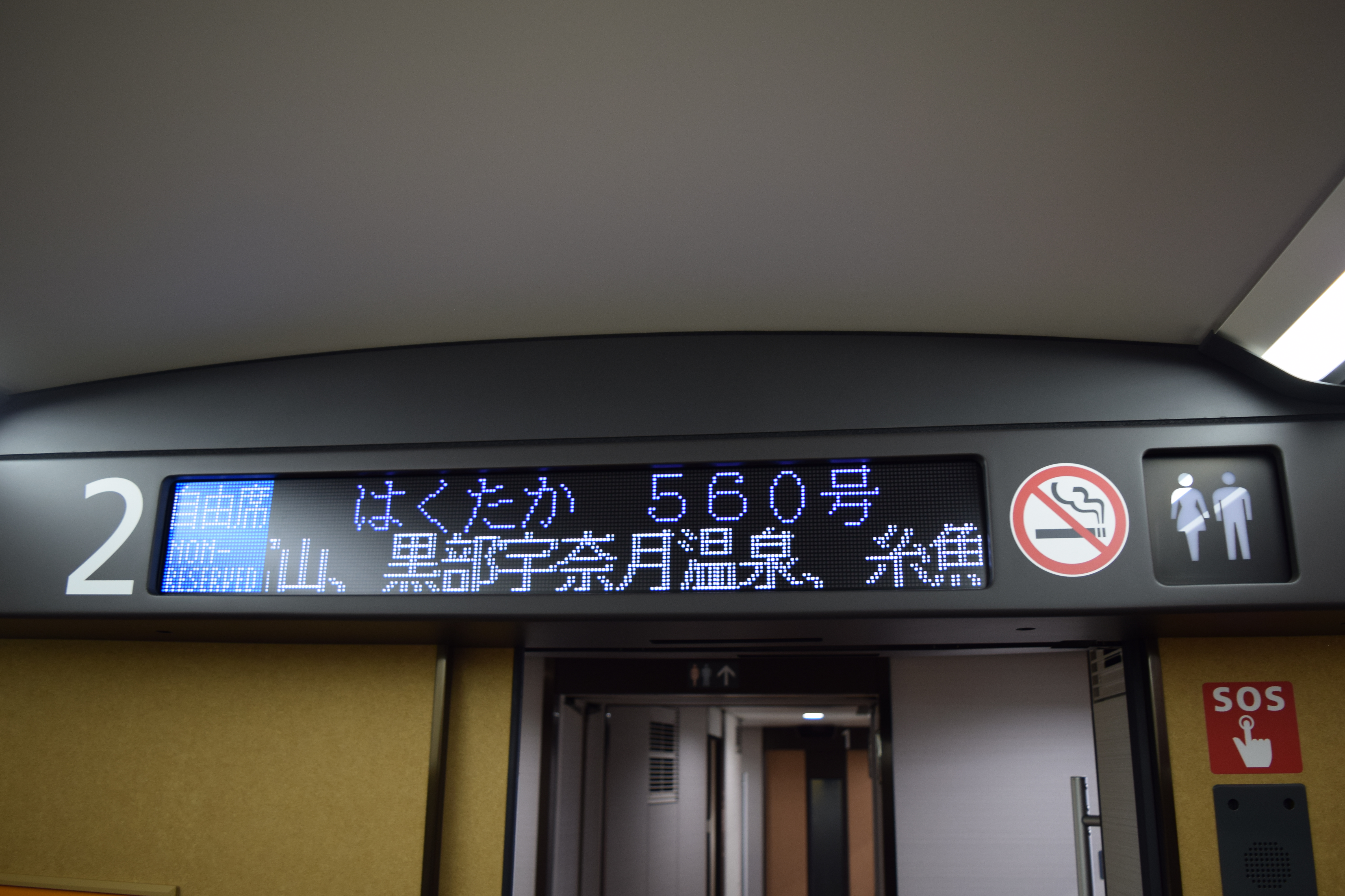 JR西日本 W7系新幹線電車 車内案内表示器